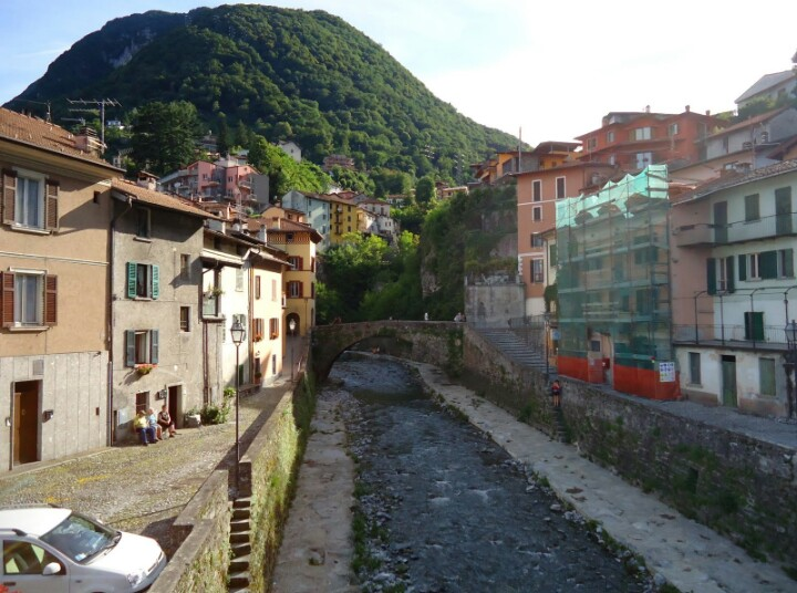 Il torrente Telo ad Argegno